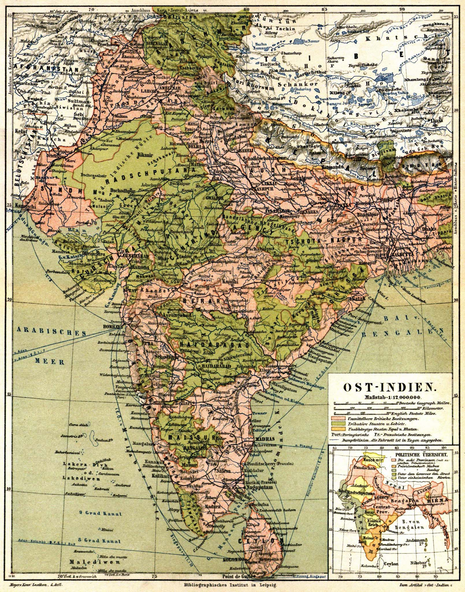 Karte „Ost-Indien“ (1 : 12,000,000) zum gleichnamigen Artikel; Nebenkarte „Politische Übersicht“